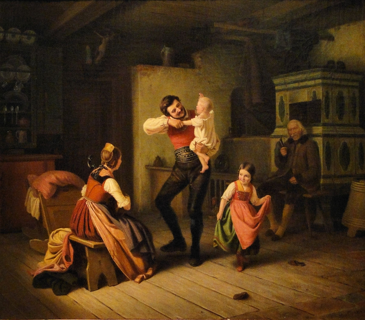 Obraz (Augusta) Ludwiga Mosta - obecnie w zbiorach Muzeum Narodowego w Szczecinie